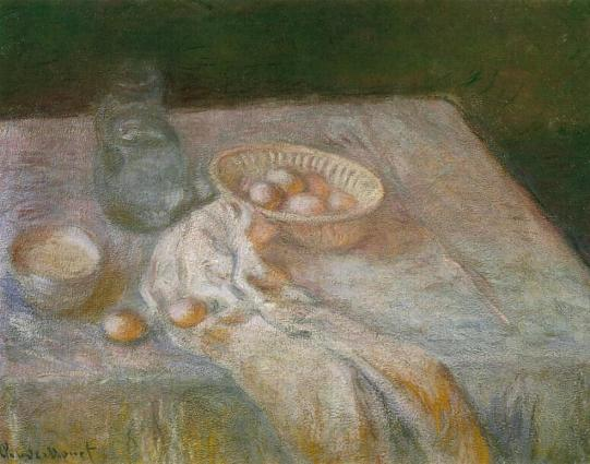 Nature morte aux œufsStill Life with Eggslabel QS:Lfr,"Nature morte aux œufs"label QS:Len,"Still Life with Eggs"label QS:Lpl,"Martwa natura z jajkami"